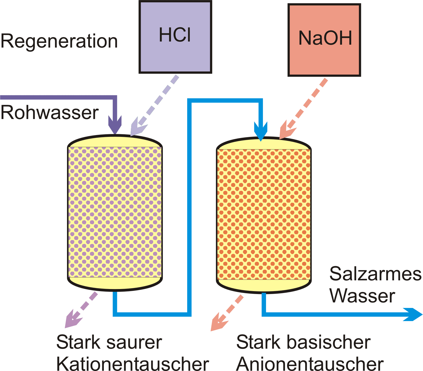 stark saurer und basischer Ionenaustauscher